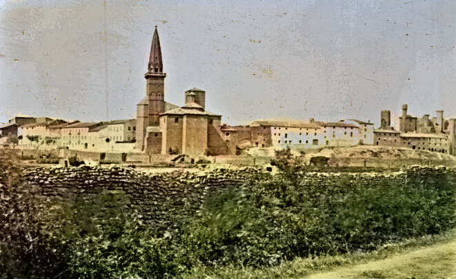 Panorámica antigua de Olite coloreada en base a una antigua foto en blanco y negro